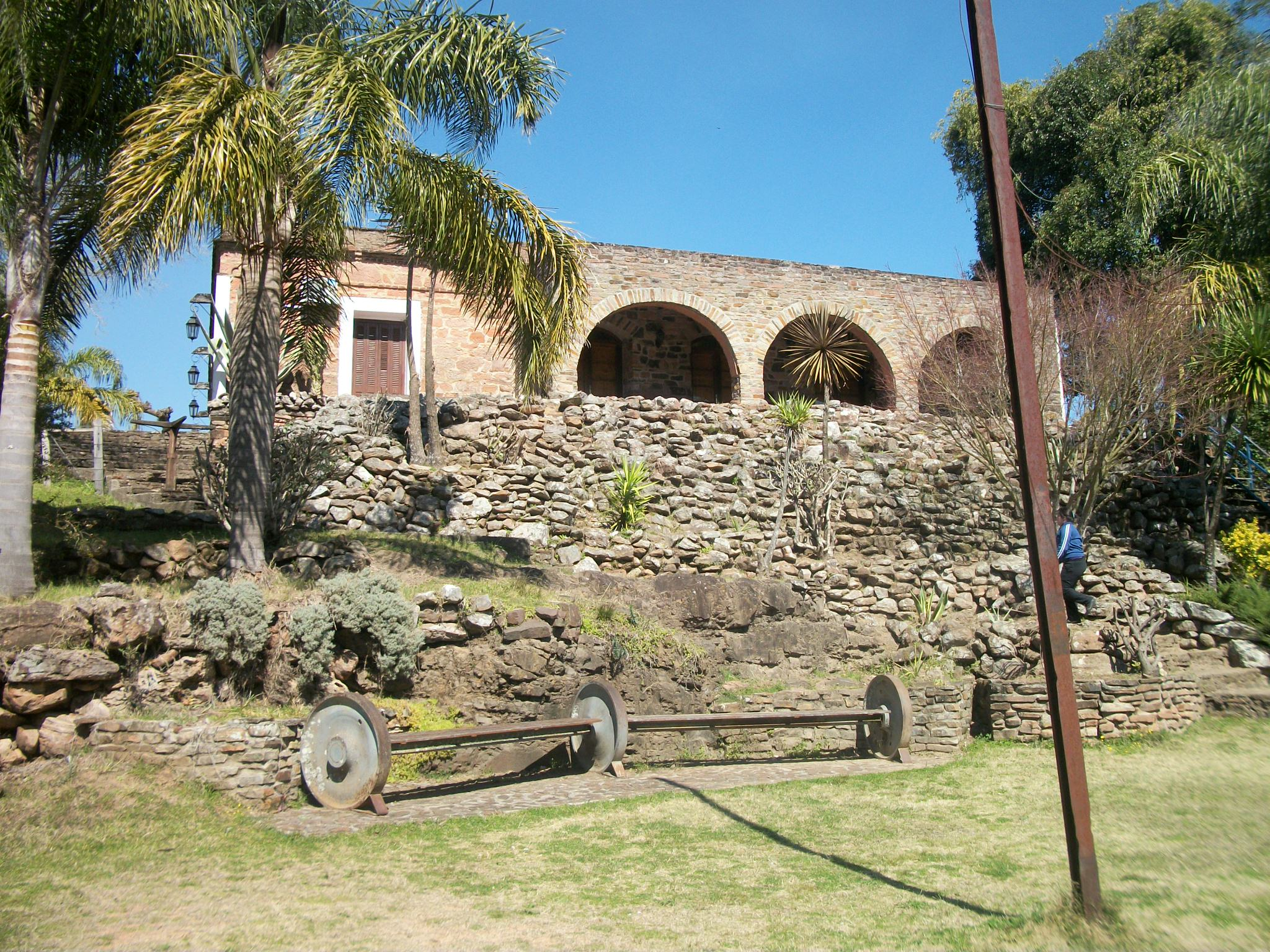 Museo Carlos Gardel, Valle Edén, Tacuarembó, Uruguay.